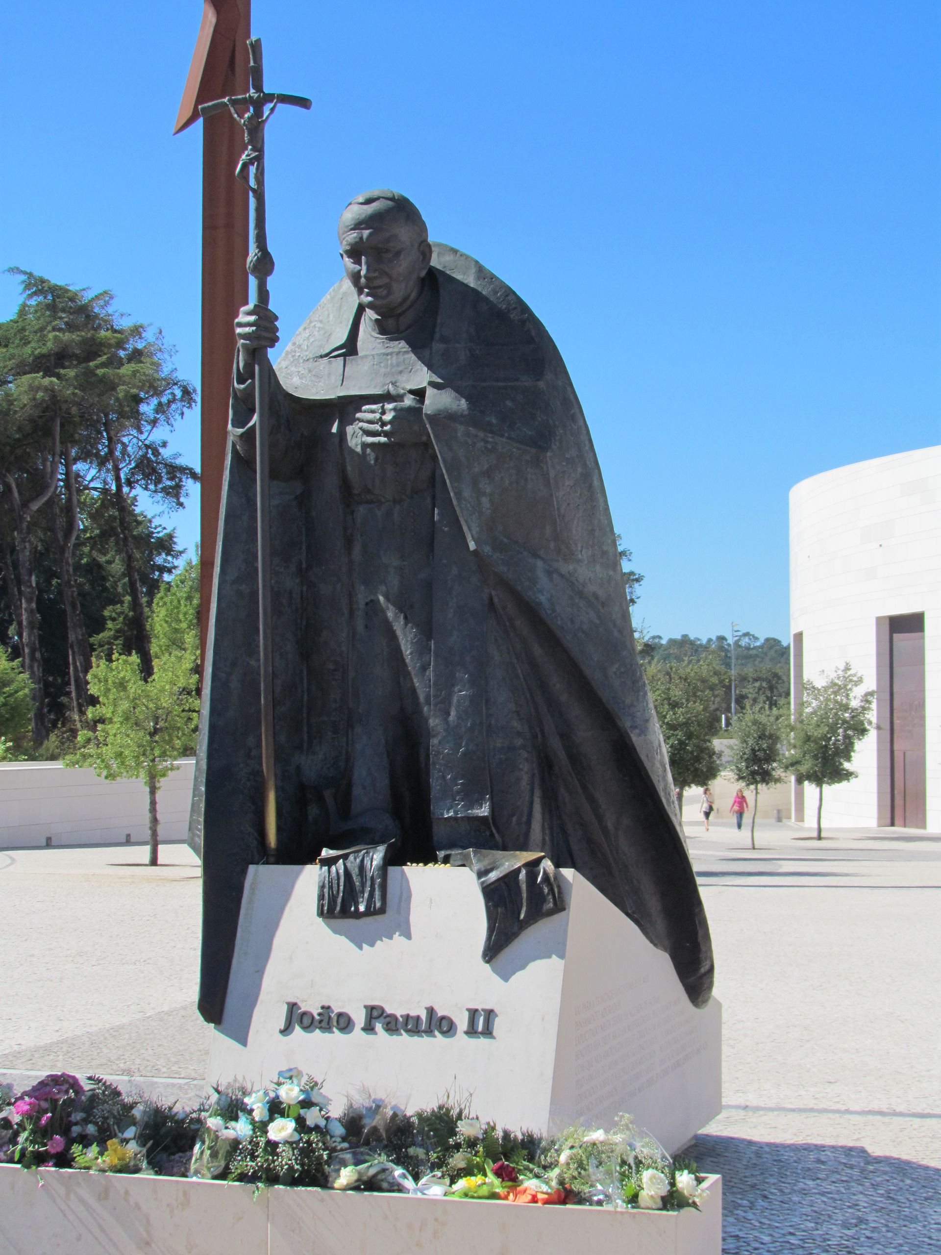 Santuário de Fátima